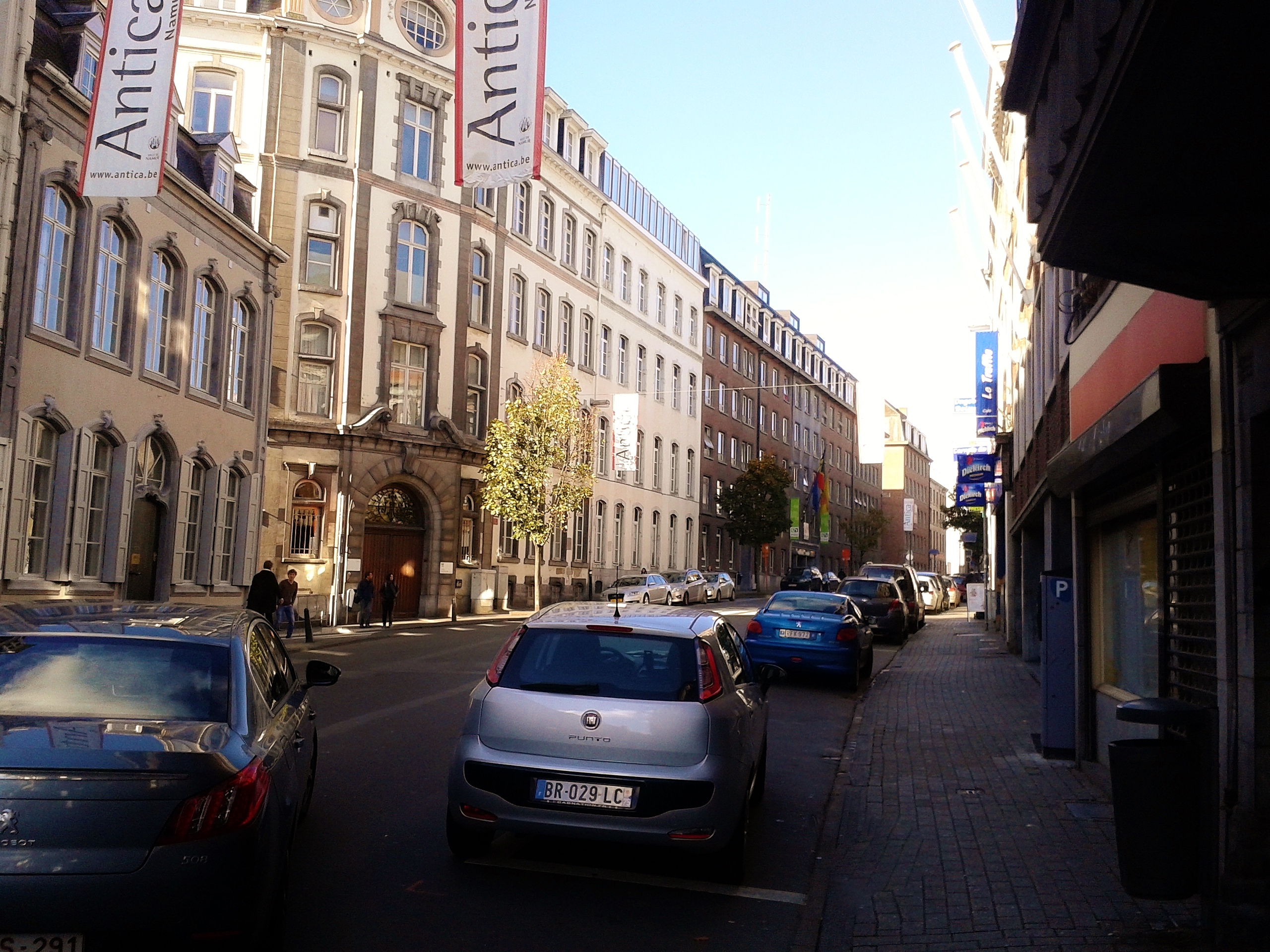 Université de Namur vue depuis la rue de Bruxelles